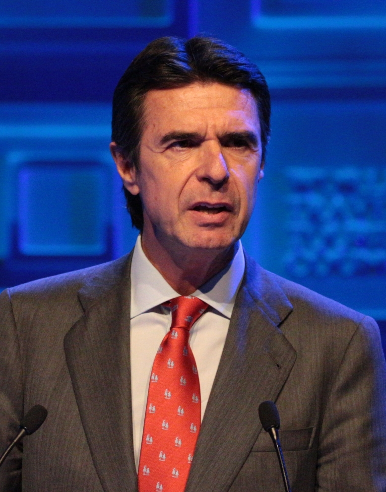 WTTC Global Summit 2015